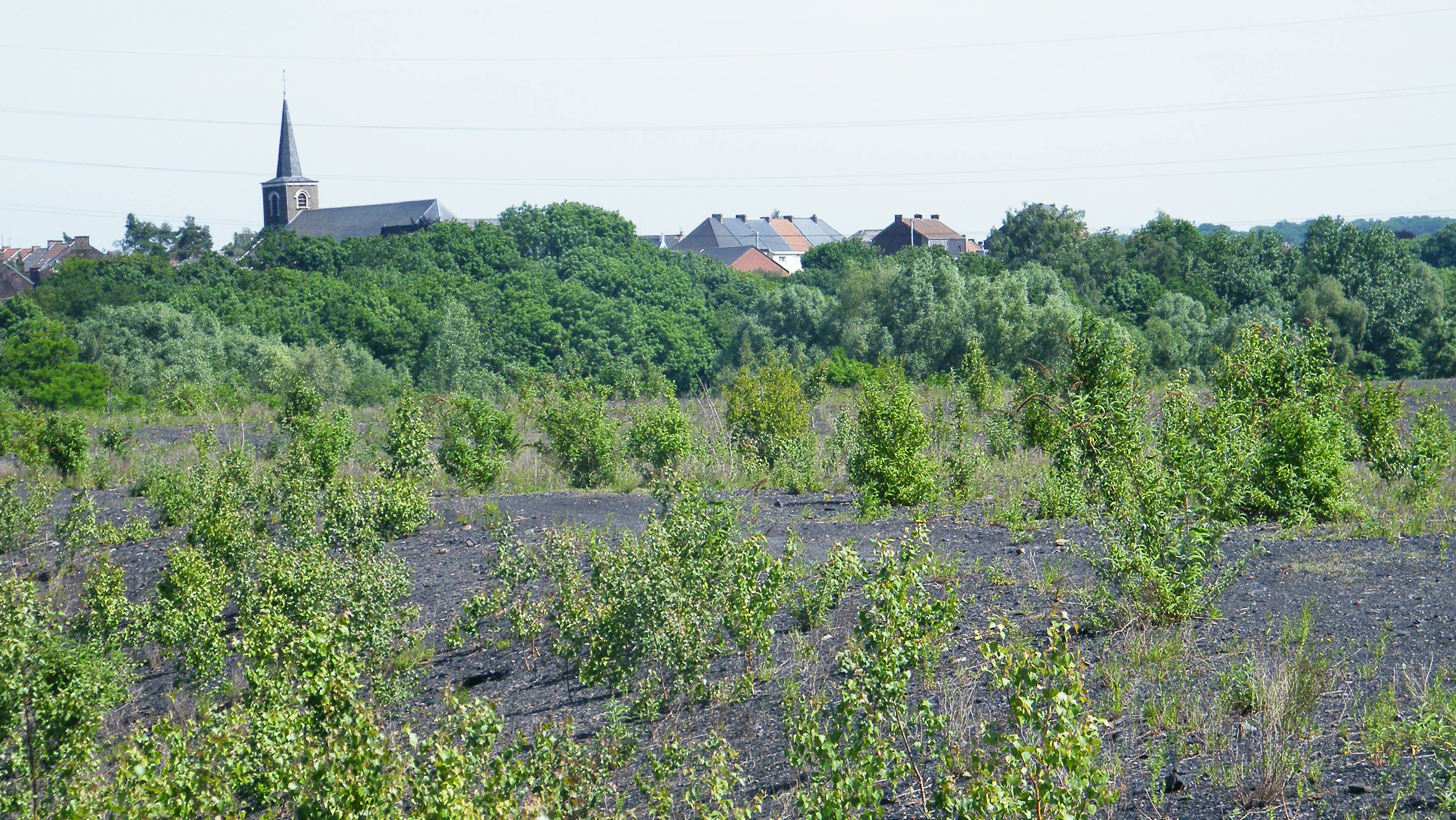 Vue de Moignelée A gauche : l’église de l'Immaculée Conception, datant de 1862.